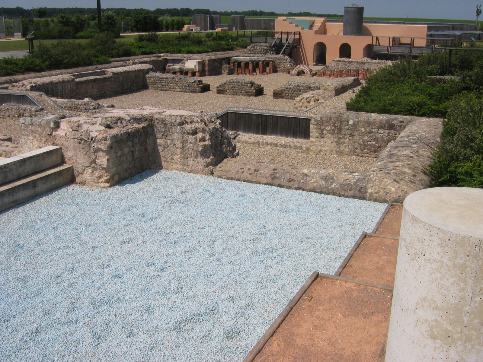 Thermes de Gisacum, commune du Vieil-Évreux, Eure